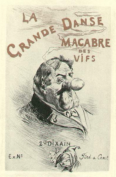 Dessins de Martin van Maele. Couverture d'un des quatres dizains de La Grande Danse macabre des vifs, 1905.